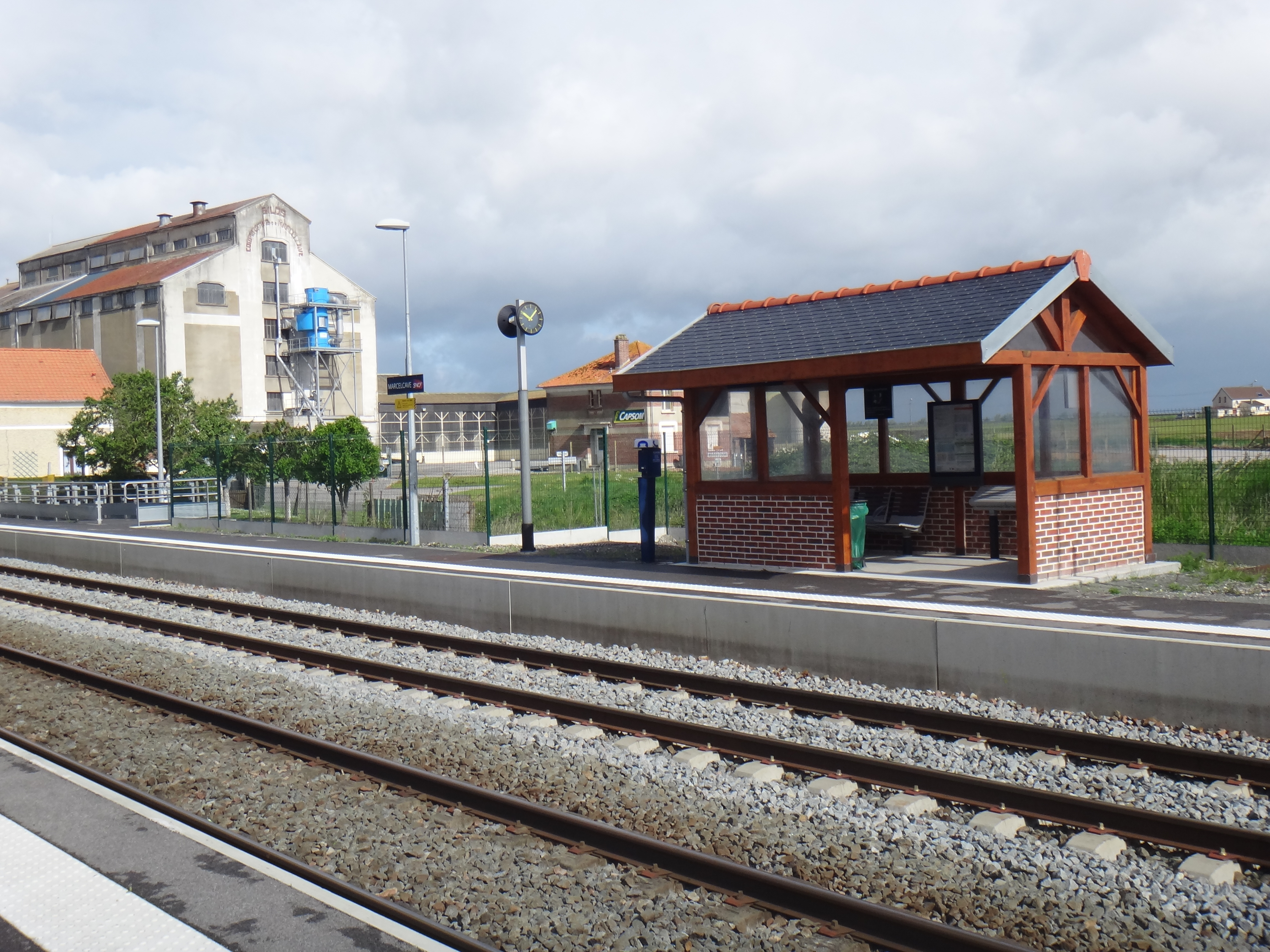 Abri de quai de la gare de Marcelcave, Somme, Picardie, France, en mai 2014.